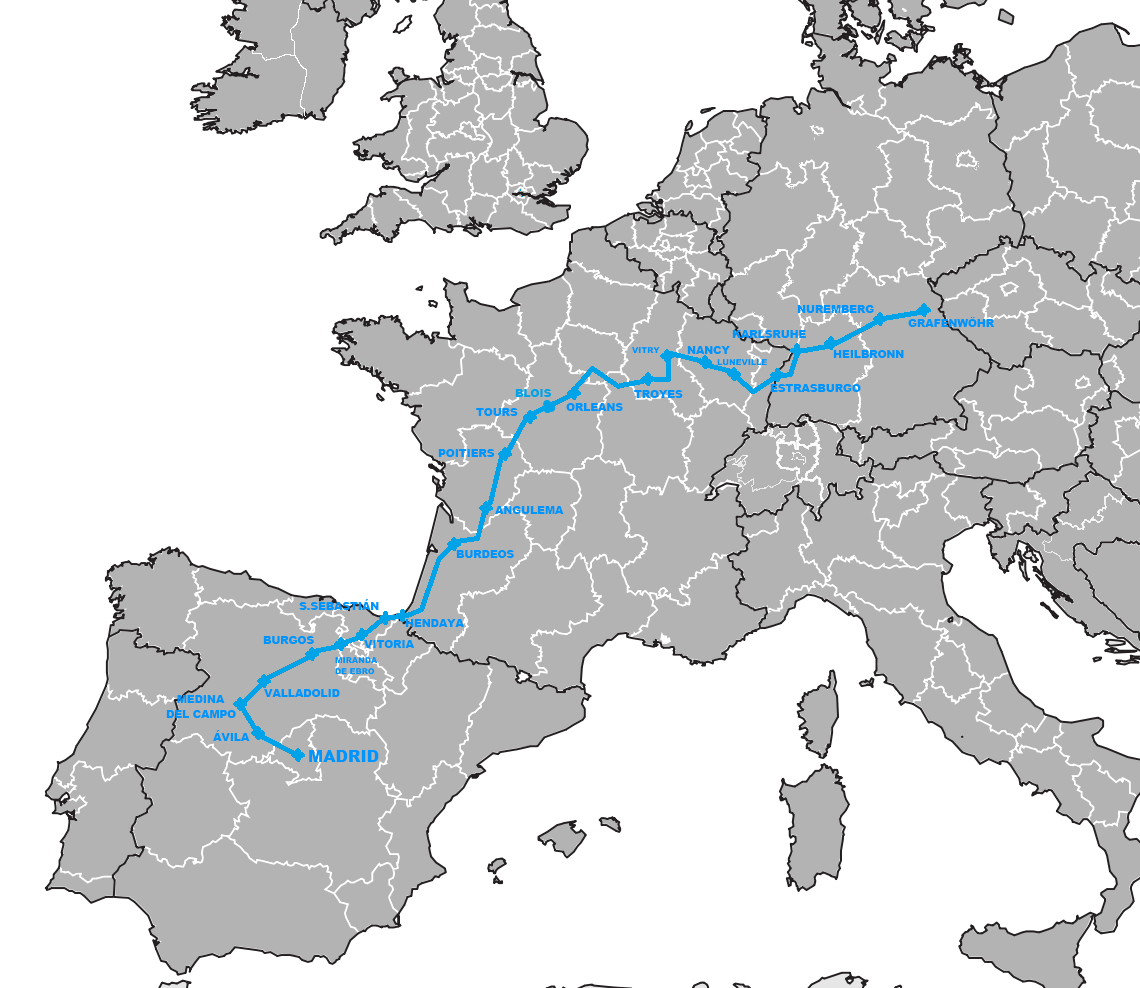 Mapa del viaje en tren realizado por las primeras expediciones de la División Azul entre España y el campo militar de Grafenwöhr en Alemania, en verano de 1941.